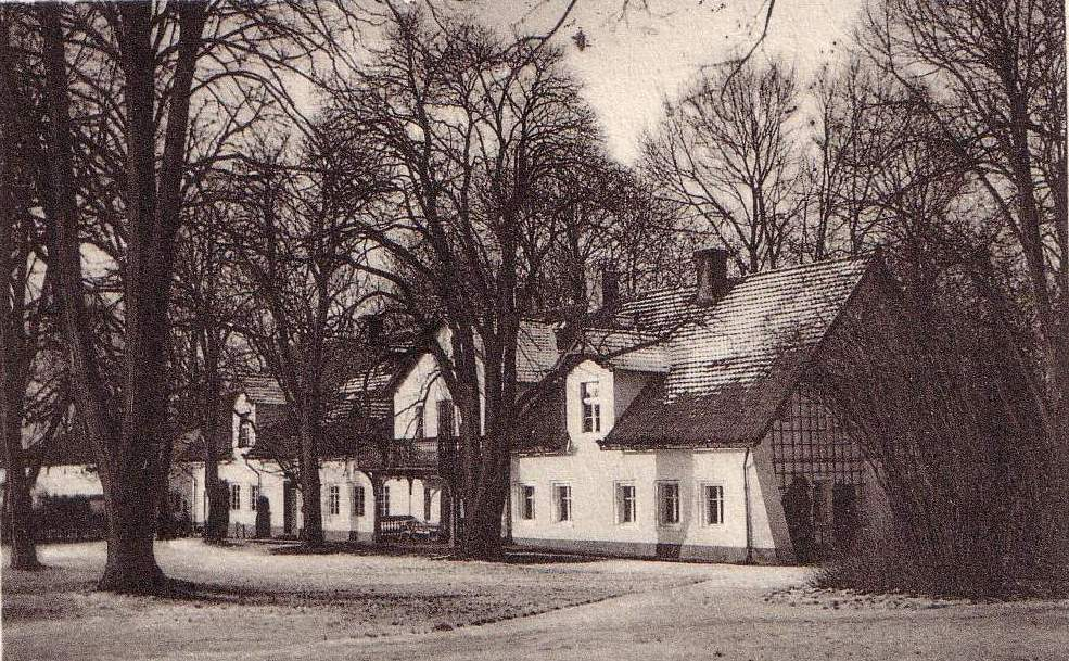 Pawonkau, farm in Silesia. Gutshaus in Pawonkau, erbaut ca 1800.